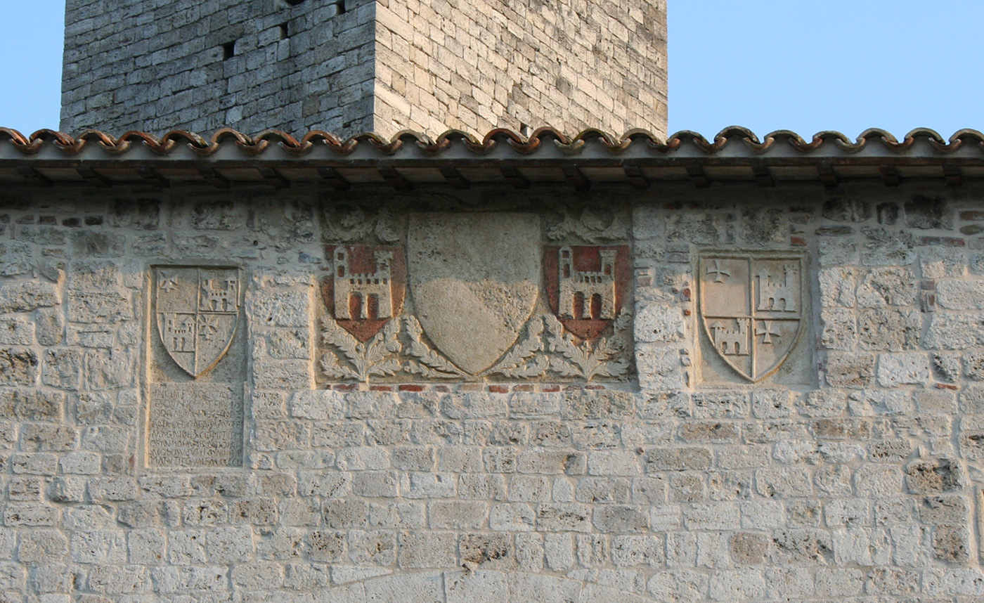 Stemmi della città di Ascoli Piceno sulle lapidi di Porta Solestà